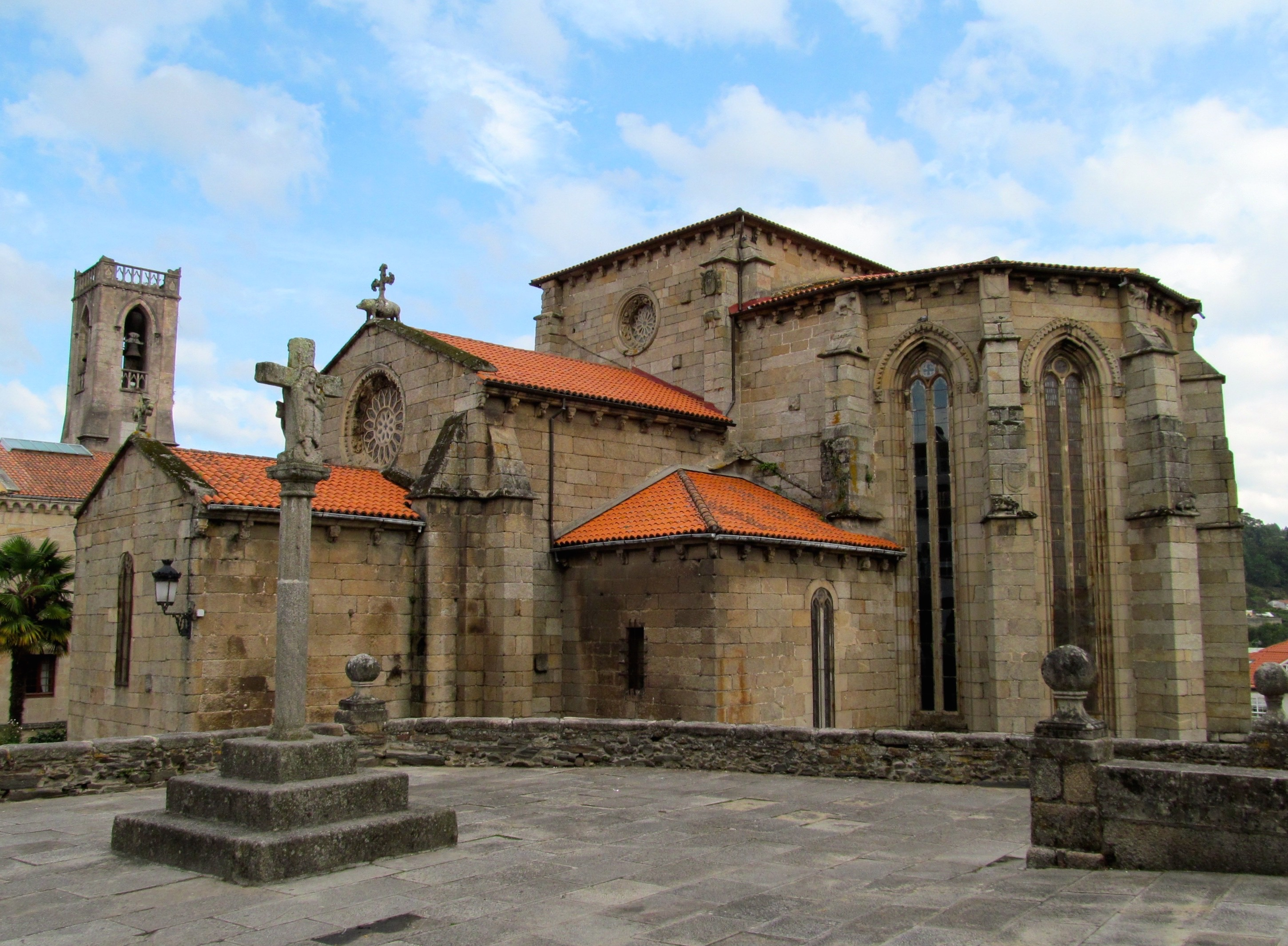 Betanzos - A igrexa de San Francisco de Betanzos é un templo de estilo gótico construído na segunda metade do século XIV. Foi declarada Monumento Nacional en 1919, e posteriormente, Ben de Interese Cultural.